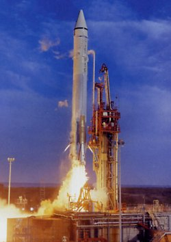 Mariner 7 lift-off - NASA